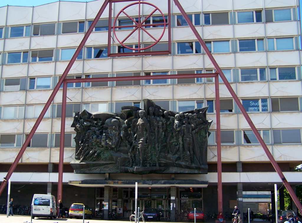 Bronzerelief vor der Universität Leipzig, erbaut 1970–1974 von Klaus Schwabe, Rolf Kurt und Frank Ruddigkeit